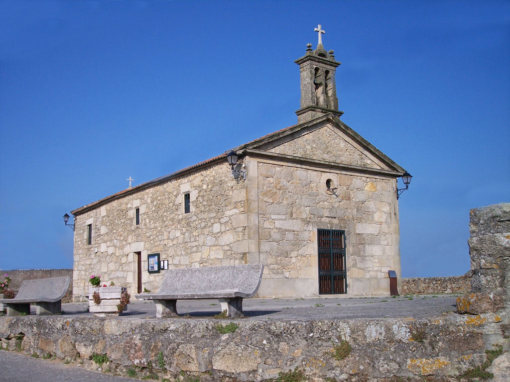 Capela da Guía (Carreira)